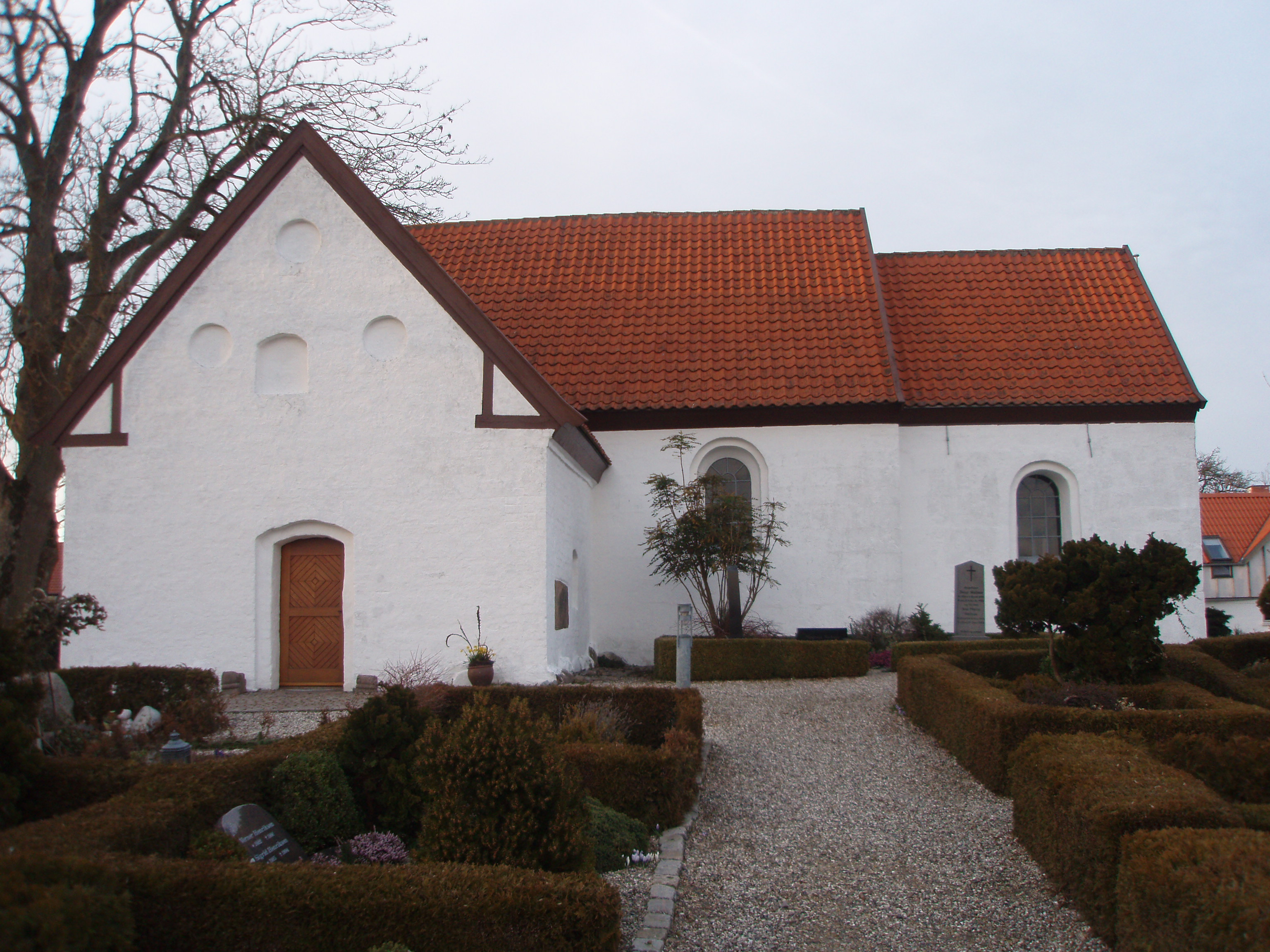 Elev Kirke set fra kirkegården